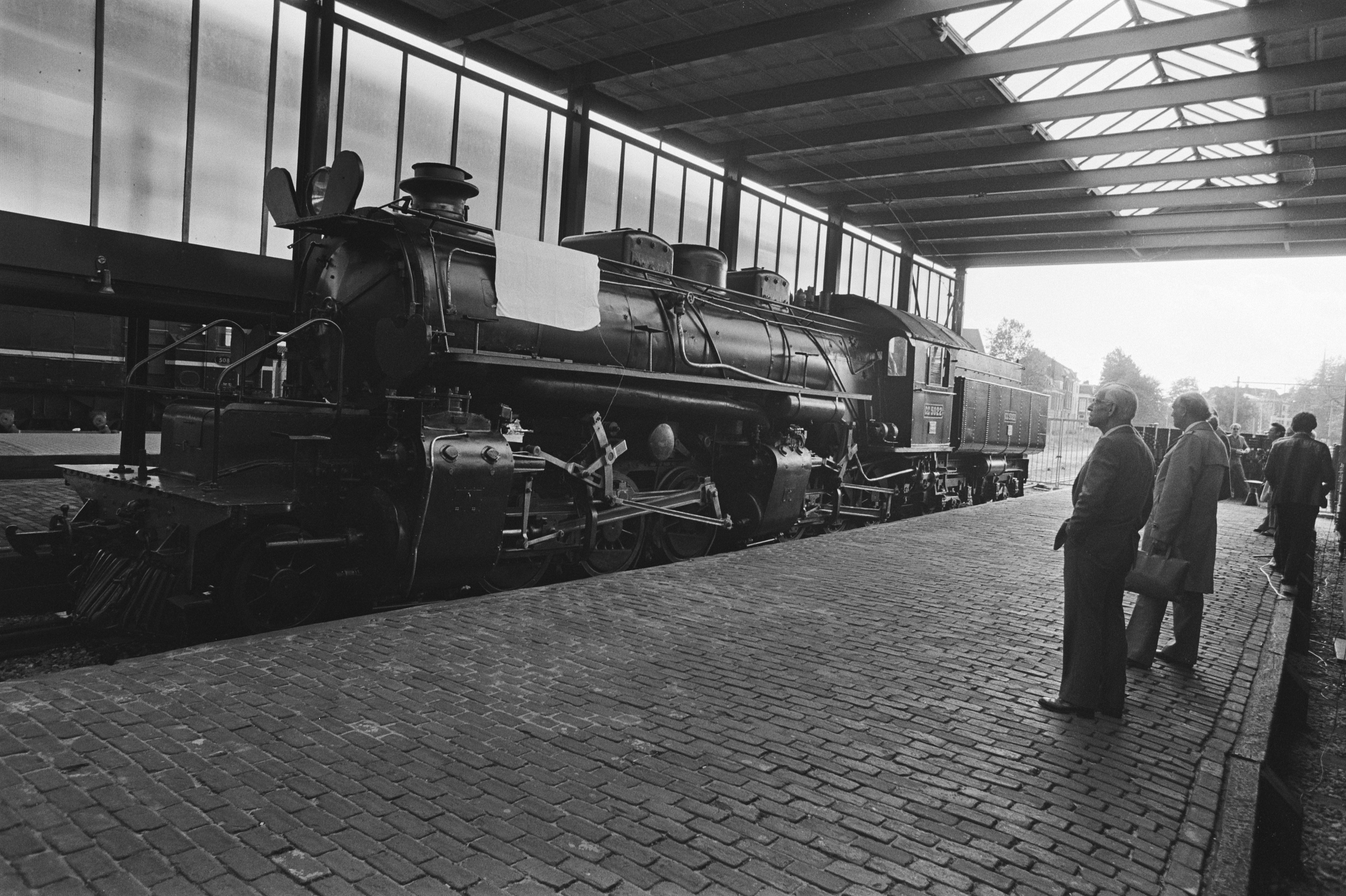 Collectie / Archief : Fotocollectie Anefo Reportage / Serie : Aantal nieuwe aanwinsten voor het Spoorwegmuseum in Utrecht Beschrijving : Mallet-locomotief CC 5022 "Sri Gunung" (Bergkoningin) van de Indonesische Spoorwegen in het Spoorwegmuseum in Utrecht Datum : 5 oktober 1981 Locatie : Utrecht, Utrecht Trefwoorden : Indonesië , locomotieven, musea, spoorwegen Instellingsnaam : Spoorwegmuseum Fotograaf : Croes, Rob C. / Anefo Auteursrechthebbende : Nationaal Archief Materiaalsoort : Negatief (zwart/wit) Nummer archiefinventaris : bekijk toegang 2.24.01.05 Bestanddeelnummer : 931-7235